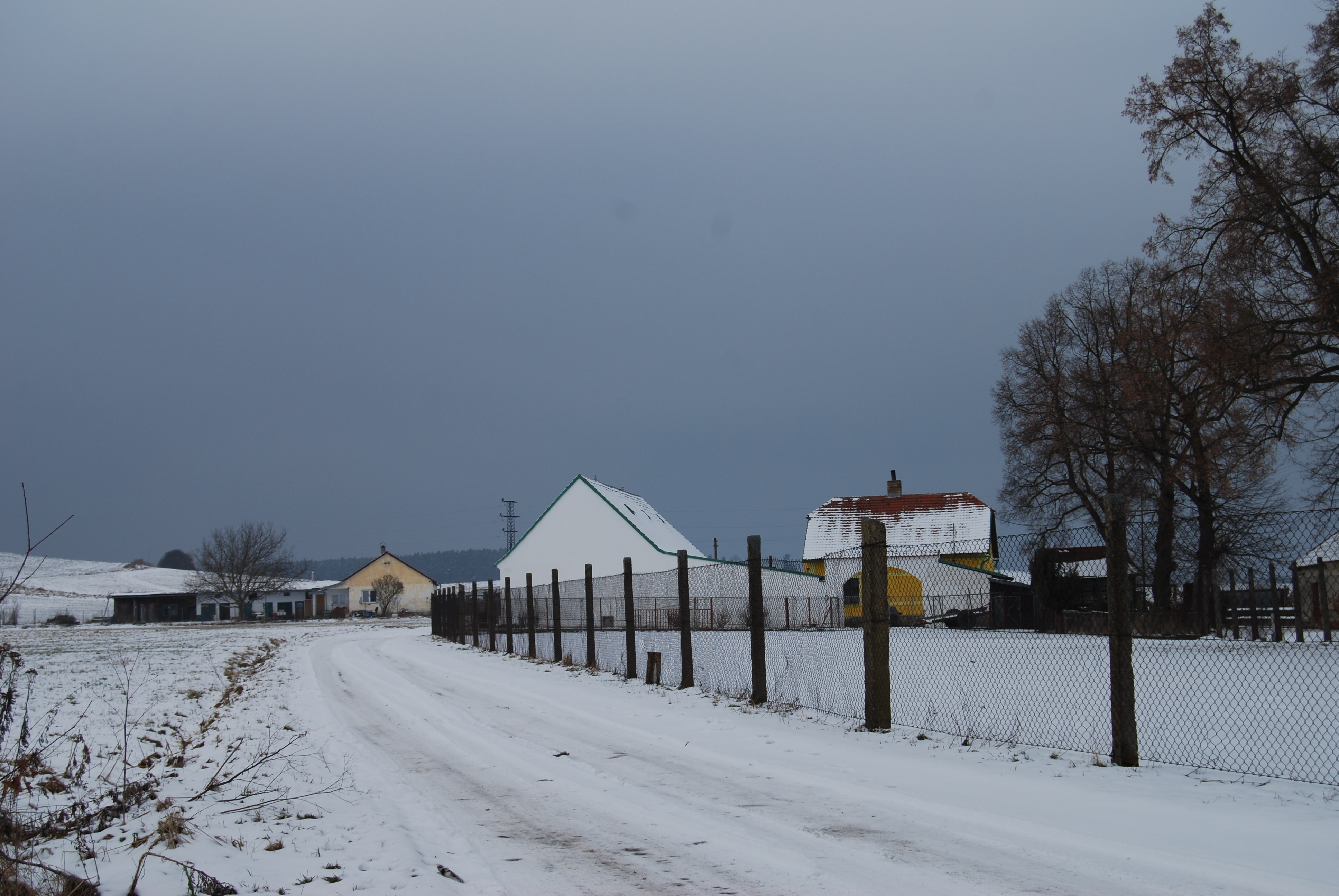 Purkratice je malá vesnice, část jihočeského okresního města Písek. Česká republika.